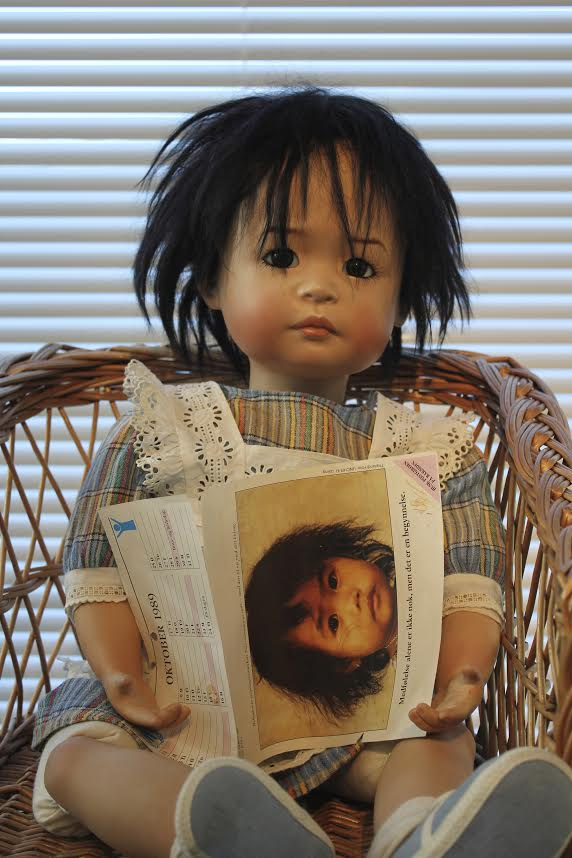 Porselensdukke modellert og laget av den norske dukkekunstneren Sissel Bjørstad Skille ca 1990. Dukken er ca 65 cm høy